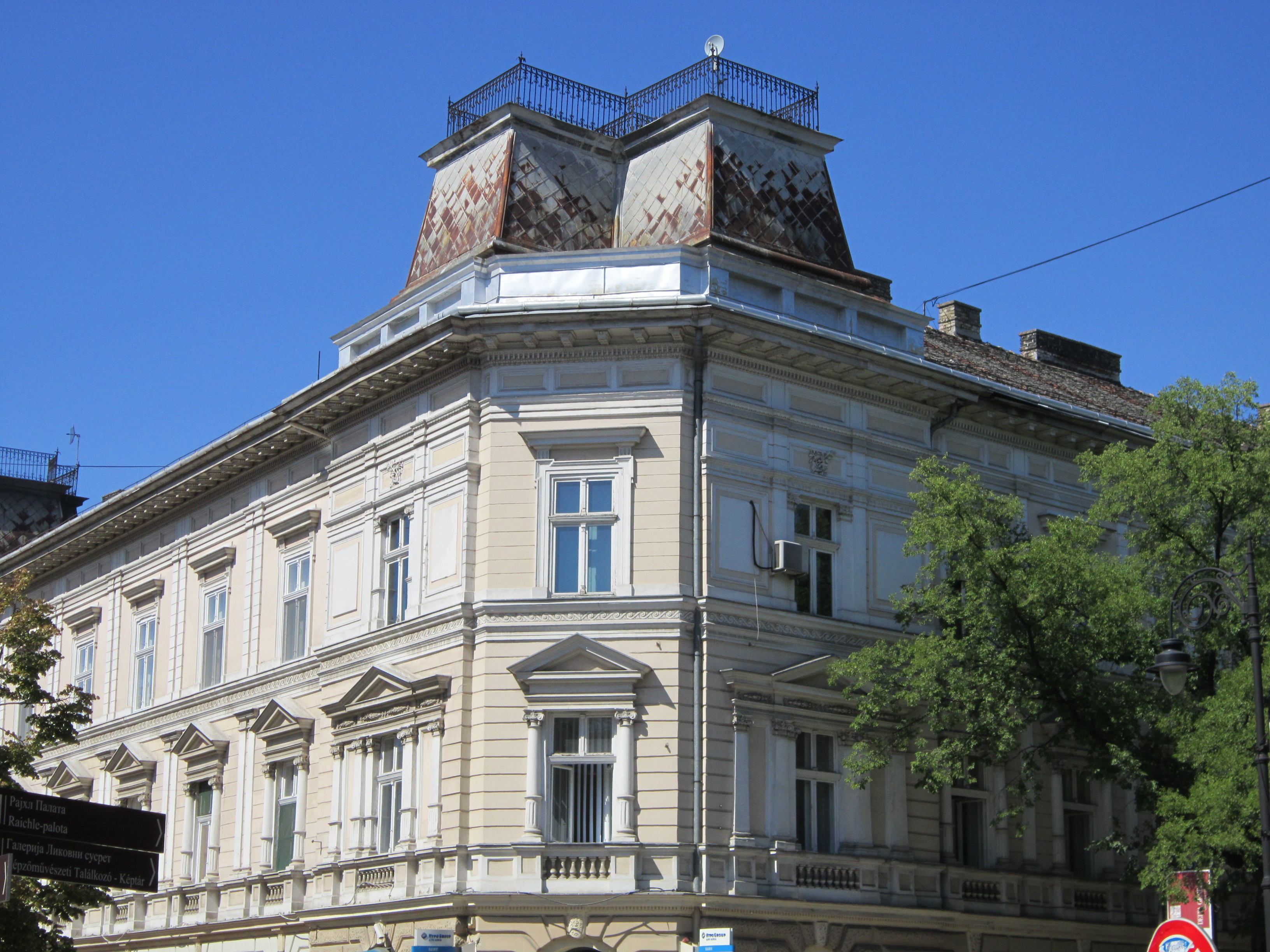 Прокеш палата , Зграда у Ул. Бориса Кидрича бр. 15 , Суботица